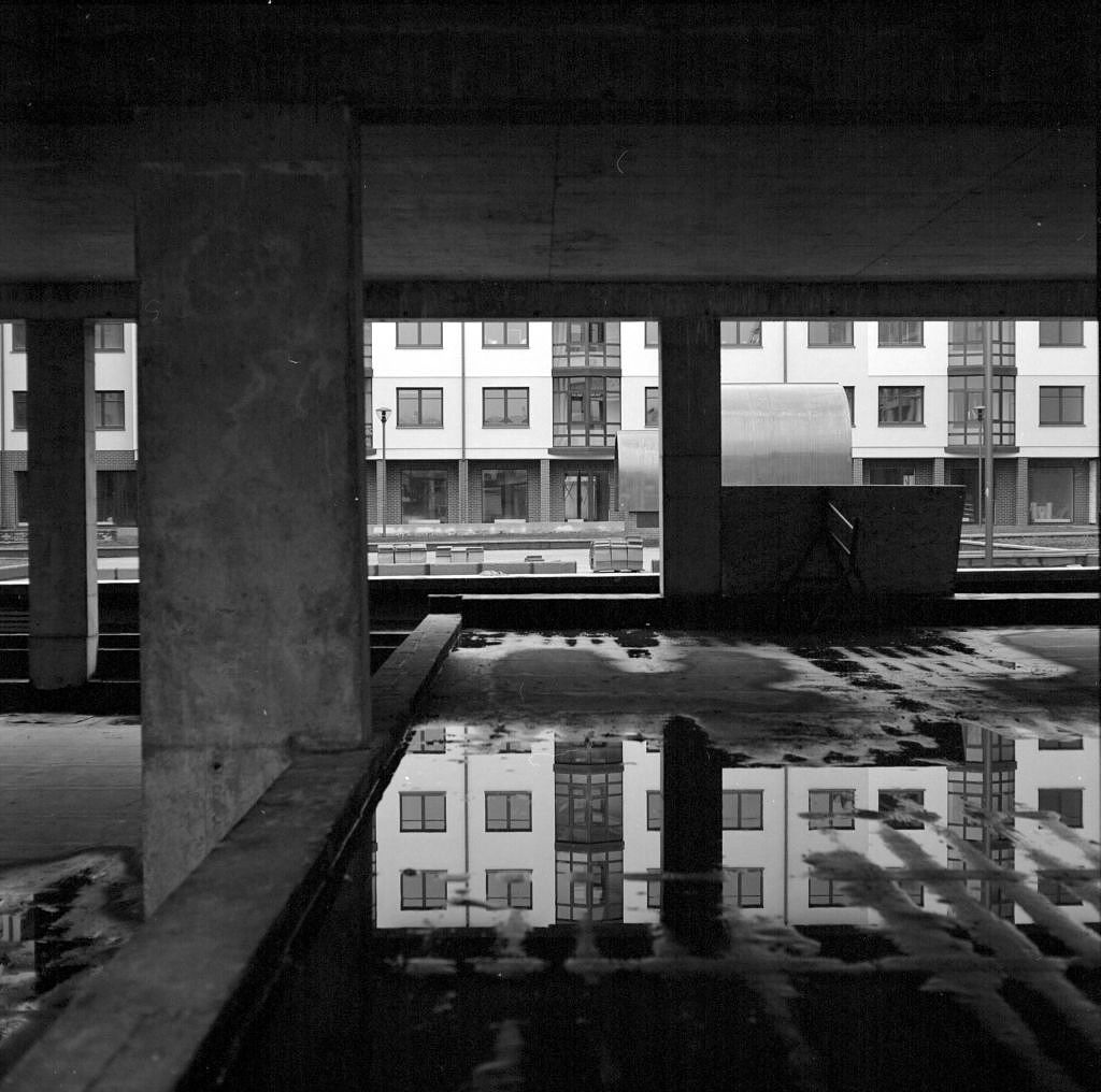 Šaltinių namai